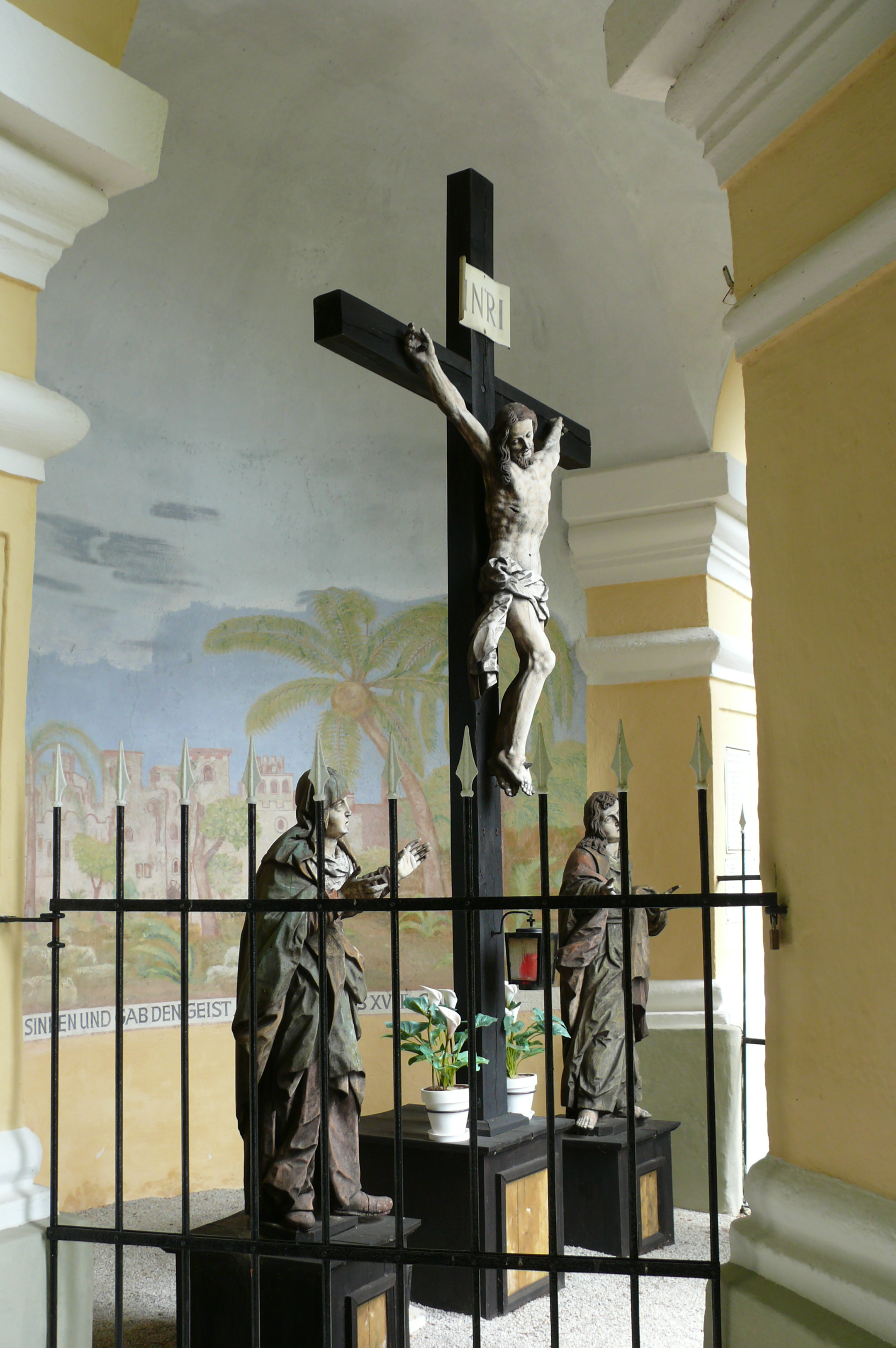 Kalvarienbergkapelle in Aigen im Mühlkreis von Johann Worath um 1650